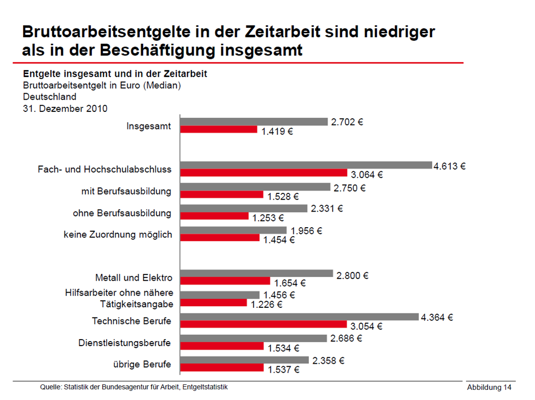 Diese Statistik ist der Öffentlichkeit als Gemeineigentum zugänglich gemacht worden. (siehe Lizenz...) So, wie man keine spezielle Extra-Lizenz benötigt, um eine vom Staat gebaute Straße zu betreten, braucht man auch keine Lizenzen, um veröffentlichte staatliche Statistiken zu verbreiten. Ich hoffe, das ist klar. Bürokratieverrückte toben sich bitte woanders aus, aber bitte nicht an sinnvoller Arbeit, danke.